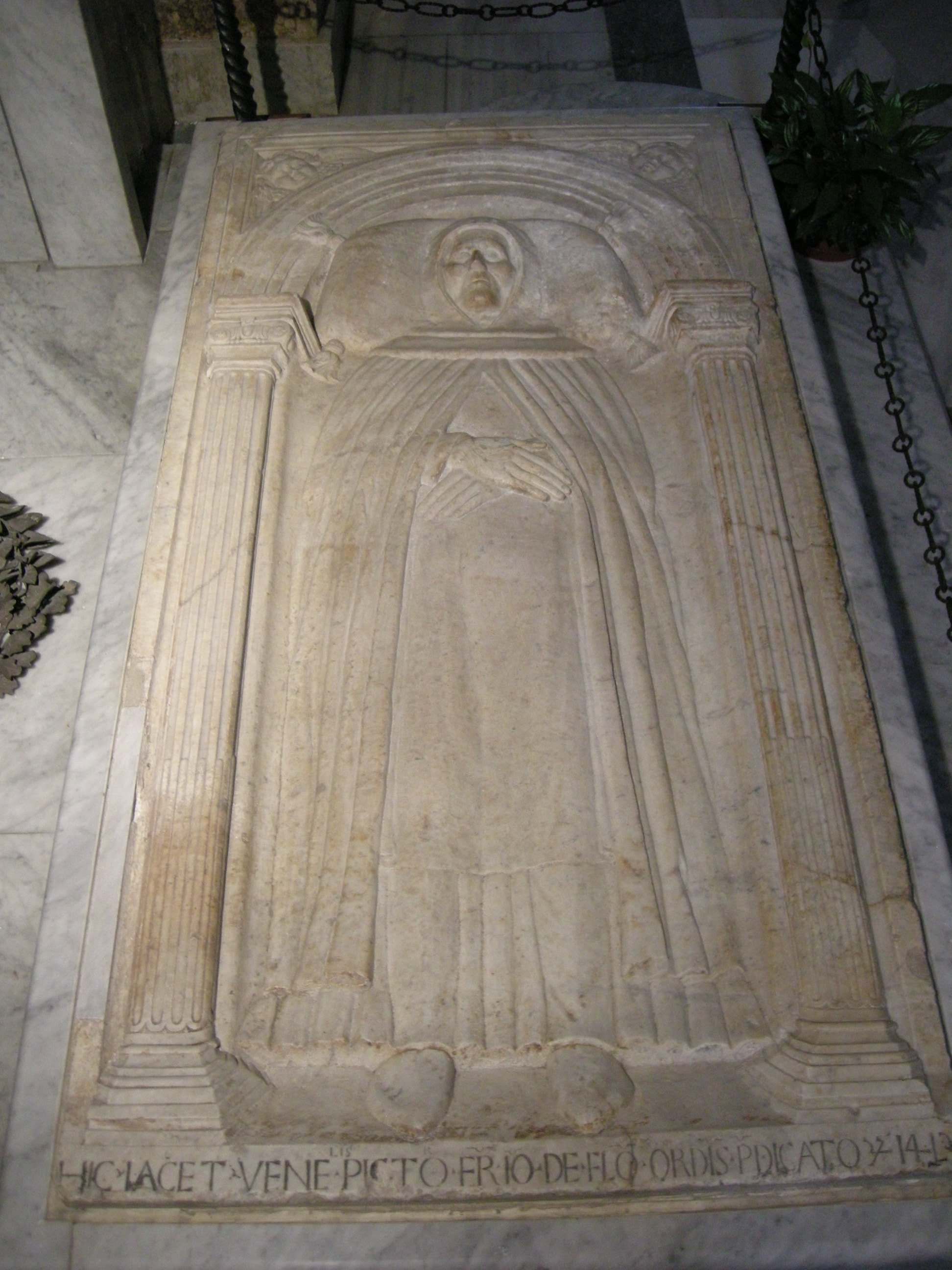 Tomba di beato angelico